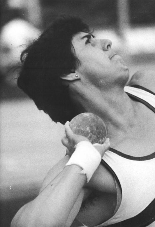 Ines Müller ADN-ZB Kluge 10.08.1985 Leipzig: DDR-Meisterschaften der Leichtathleten-Die Rostockerin Ines Müller gewann das Kugelstoßen am 09.08. mit 20,67 Meter.